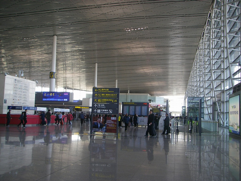 天津浜海国際空港国内線出発口